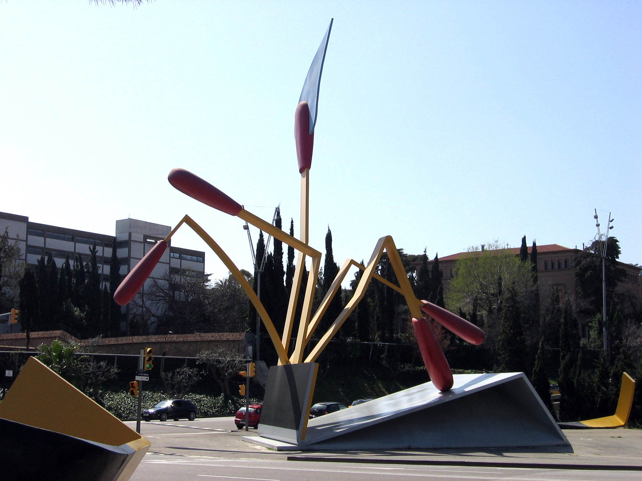 Mistos, de Claes Oldenburg, Parque del Valle de Hebrón, Barcelona.